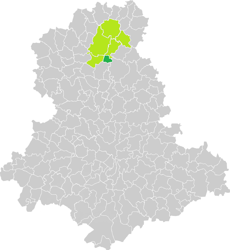 Carte de situation de la commune de Villefavard (en vert foncé) dans le votre Canton (en vert clair) sur une carte des communes de la Haute-Vienne